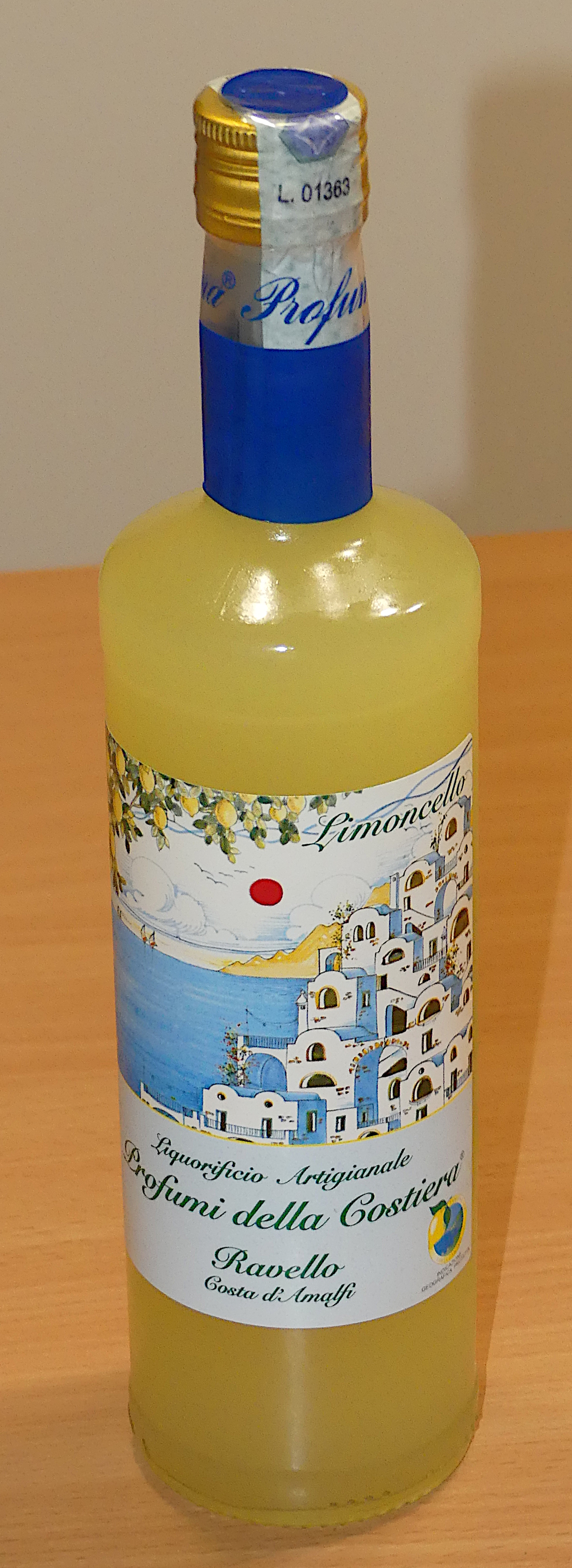 Bouteille de Limoncello de production artisanale provenant de Ravello, avec l'I. G. P. "Limone Costa d'Amalfi"